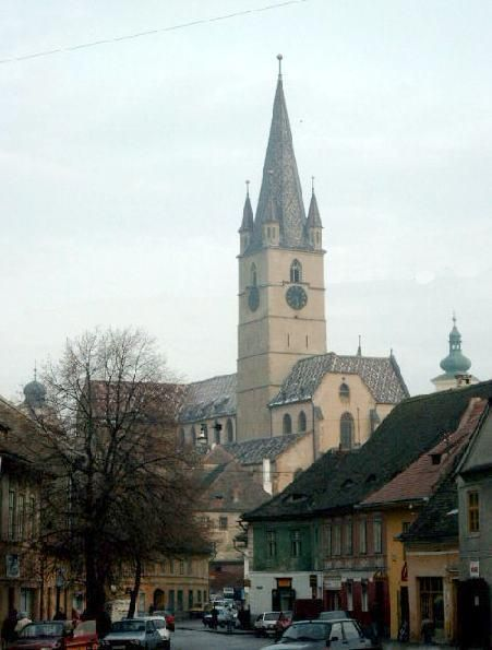 Evangelische Pfarrkirche in Hermannstadt (RO).